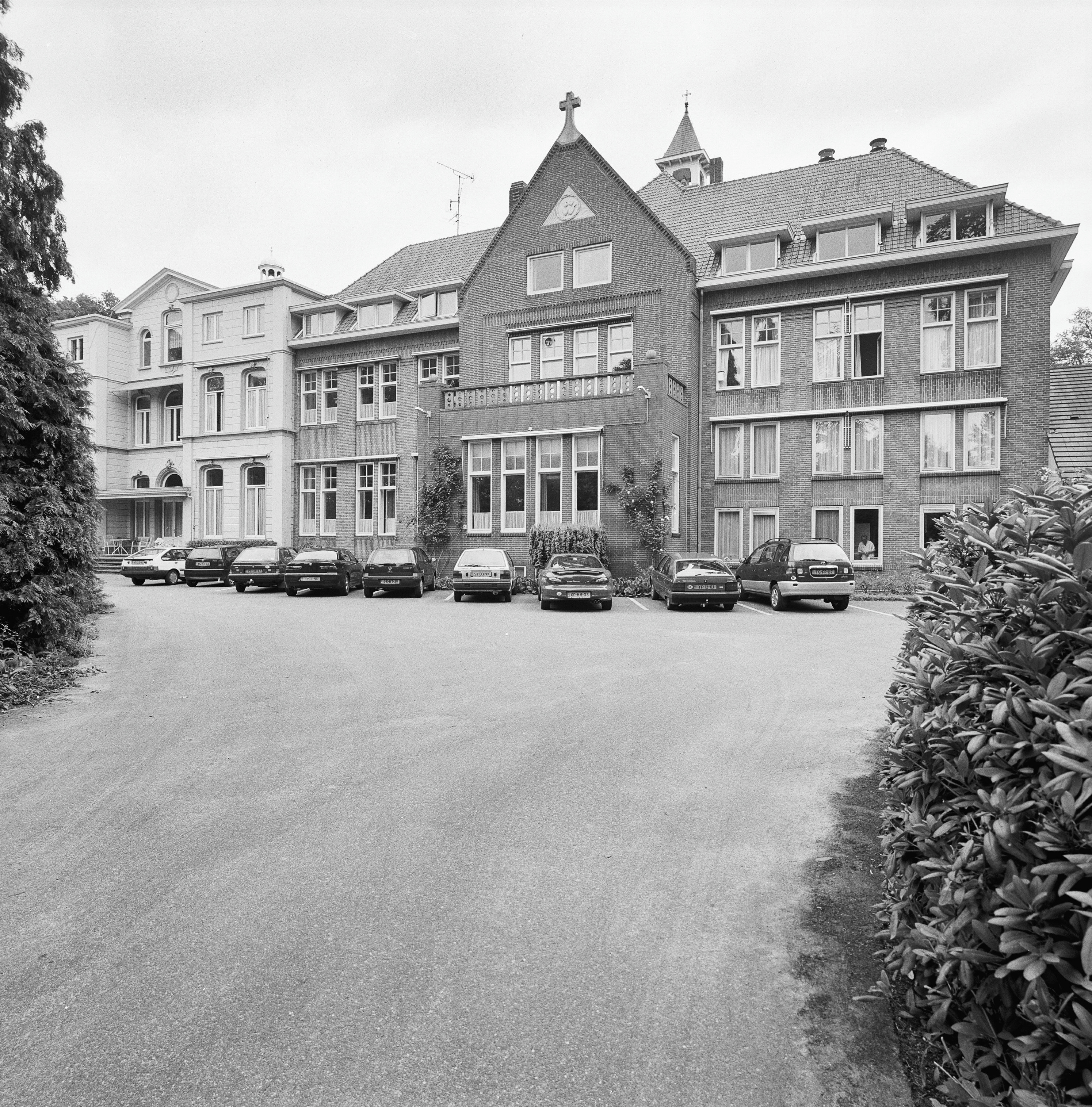 Klooster Paters Heilig Hart: Exterieur overzicht voorzijde, van links naar rechts voormalige villa en patersklooster